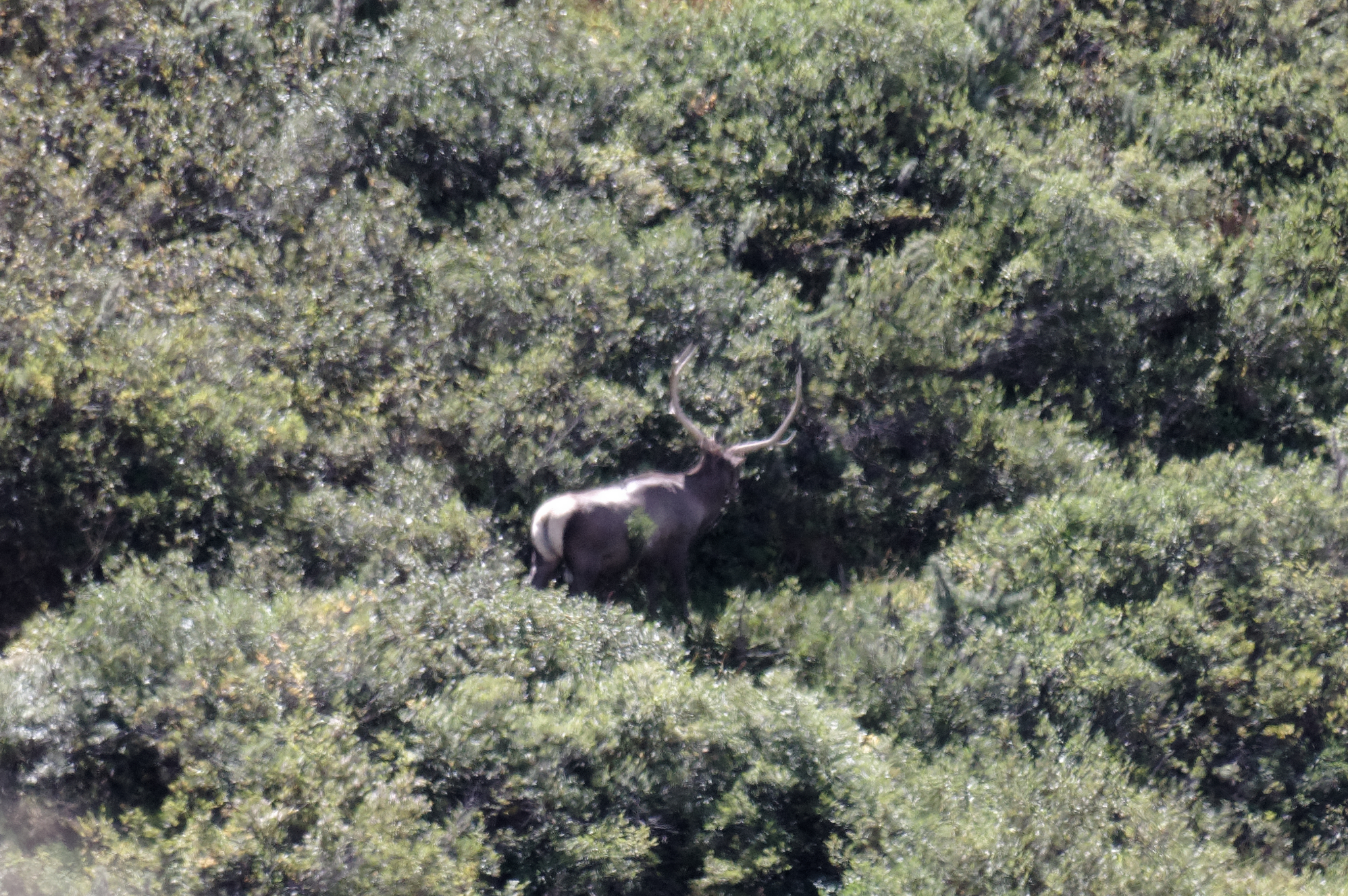 Ongulé dans la réserve naturelle de Naryn.